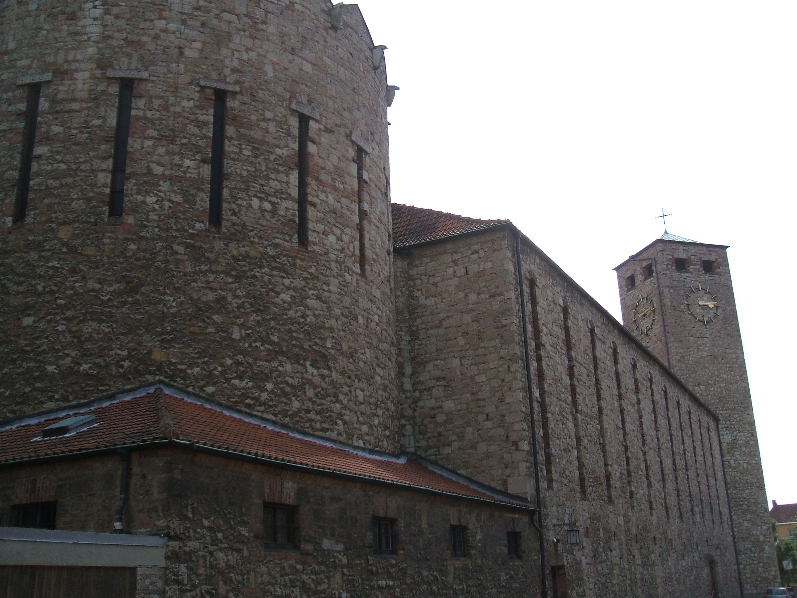 Kath. Pfarrkirche St. Heinrich Bamberg